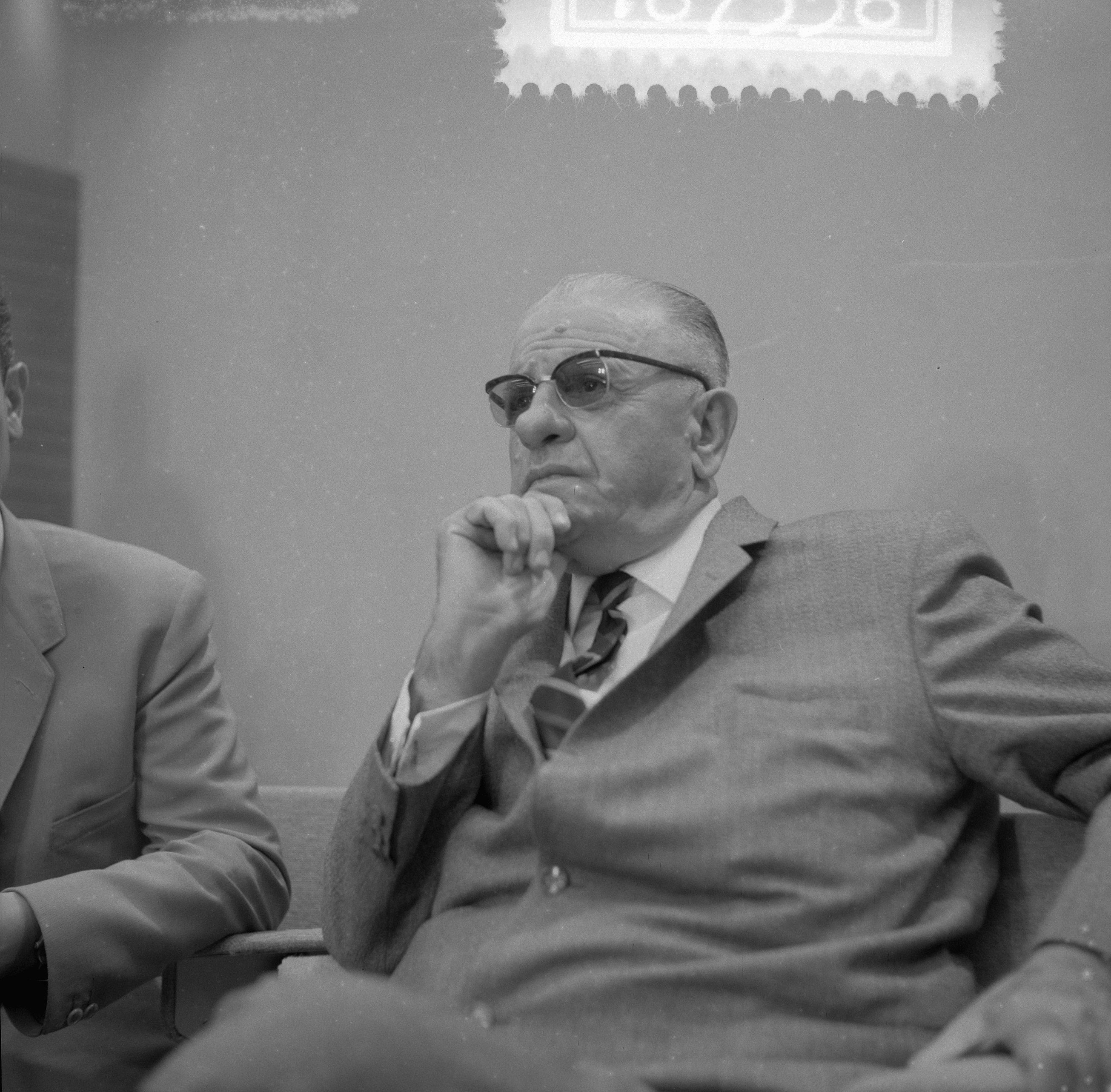 Collectie / Archief : Fotocollectie Anefo Reportage / Serie : [ onbekend ] Beschrijving : Turkse chef Generale staf (Generaal Sunay), Datum : 10 augustus 1964 Locatie : Turkije Trefwoorden : generaals Fotograaf : Broers, F.N. / Anefo Auteursrechthebbende : Nationaal Archief Materiaalsoort : Negatief (zwart/wit) Nummer archiefinventaris : bekijk toegang 2.24.01.03 Bestanddeelnummer : 916-7536